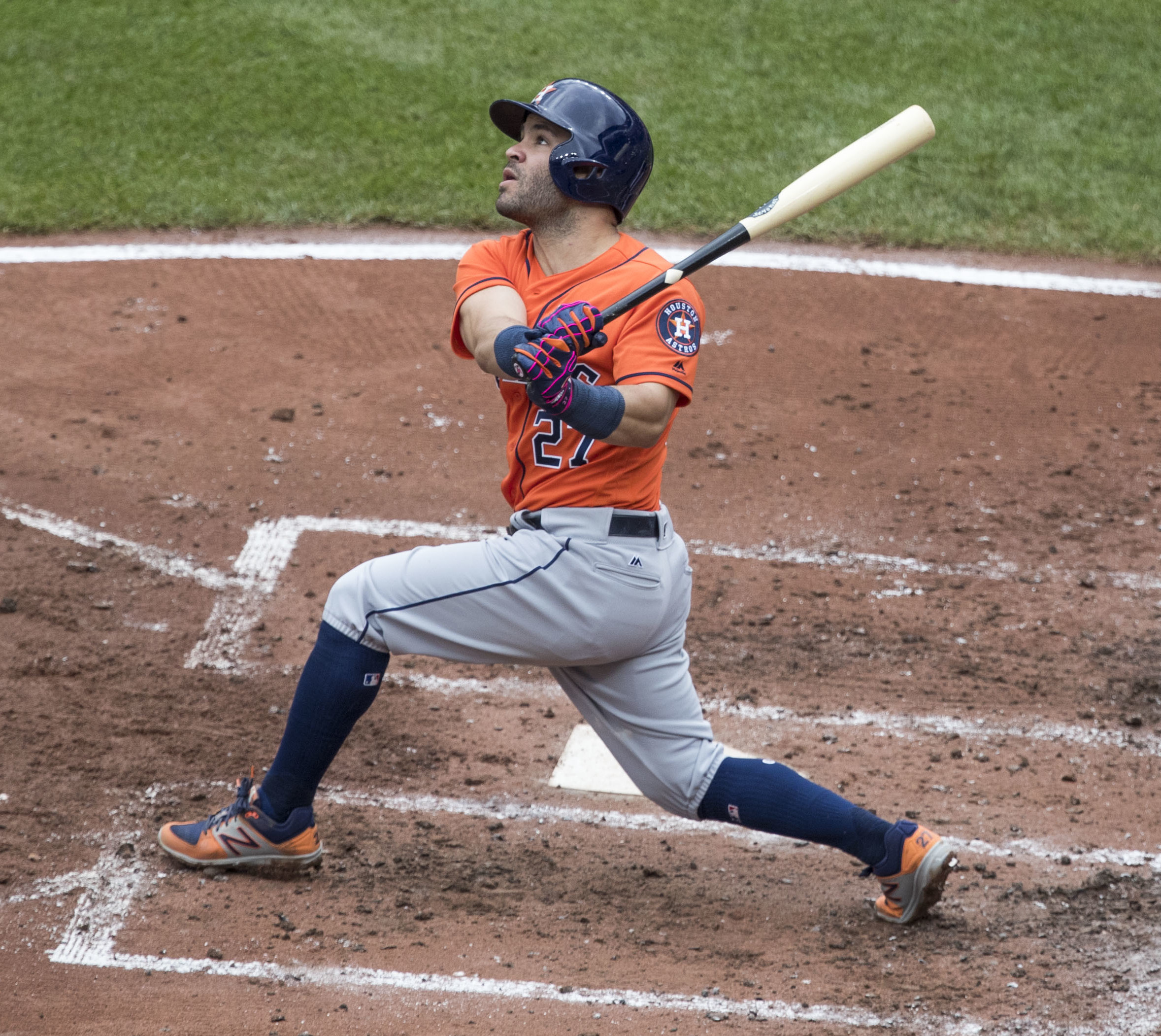 Astros at Orioles 7/23/17